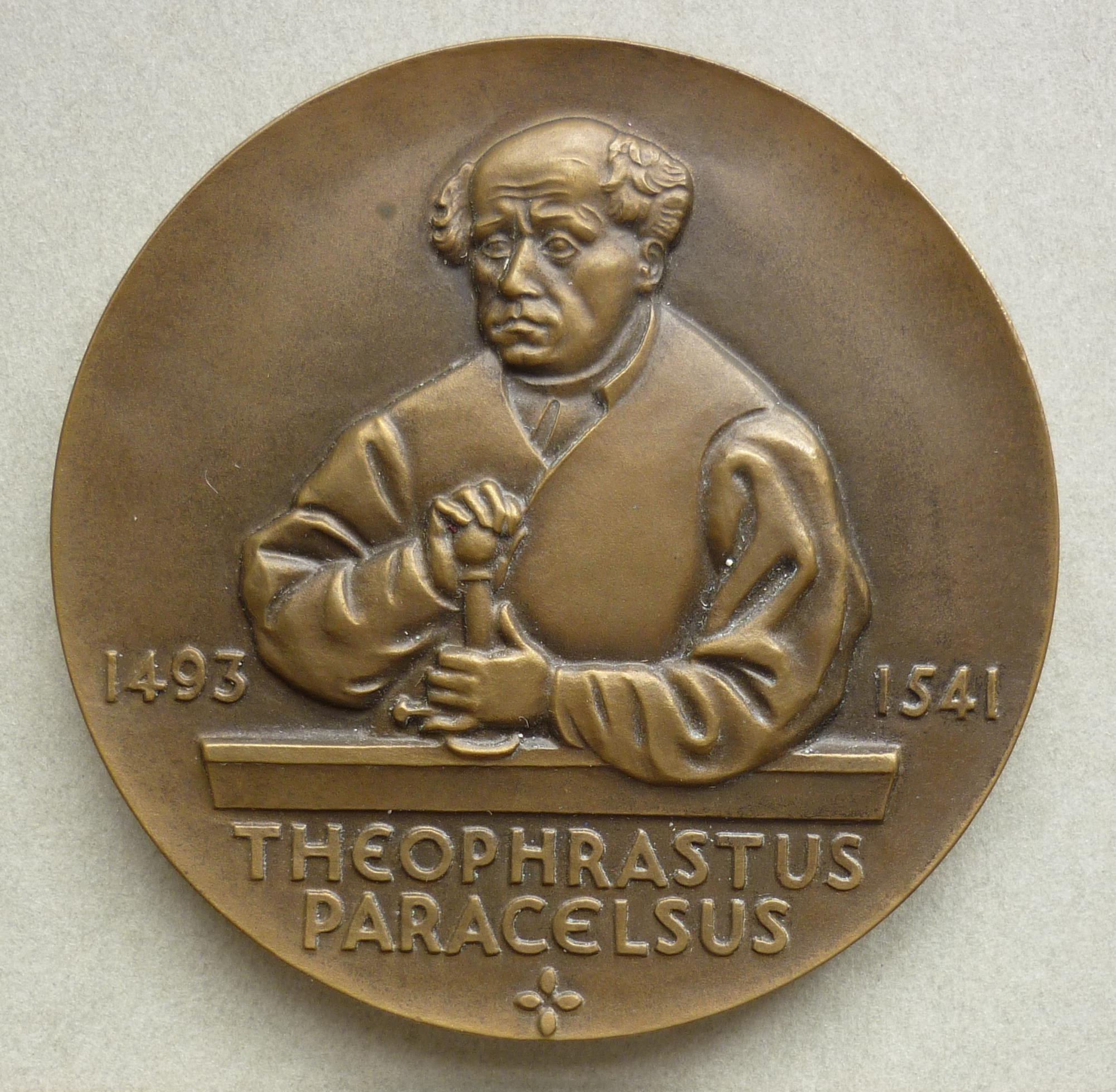 Werner F. Kunz (1896-1981): Theophrastus Paracelsus von Hohenheim (1493 – 1541) Arzt, Alchemist, Astrologe, Mystiker, Laientheologe und Philosoph; Gedenkplakette (1940, Bronze) für die Schweiz. Chem. Gesellschaft SCG aus Anlass des 500. Todestages von Paracelsus. Die Medaille findet sich in Münz- und Medaillensammlungen, u.a. im Stadtarchiv Zürich, Sign. X.B.242. - Sie wird bis dato alle zwei Jahre durch die SCG als Paracelsus-Preis verliehen an international herausragende Wissenschaftler für ein Lebenswerk der chemischen Forschung.